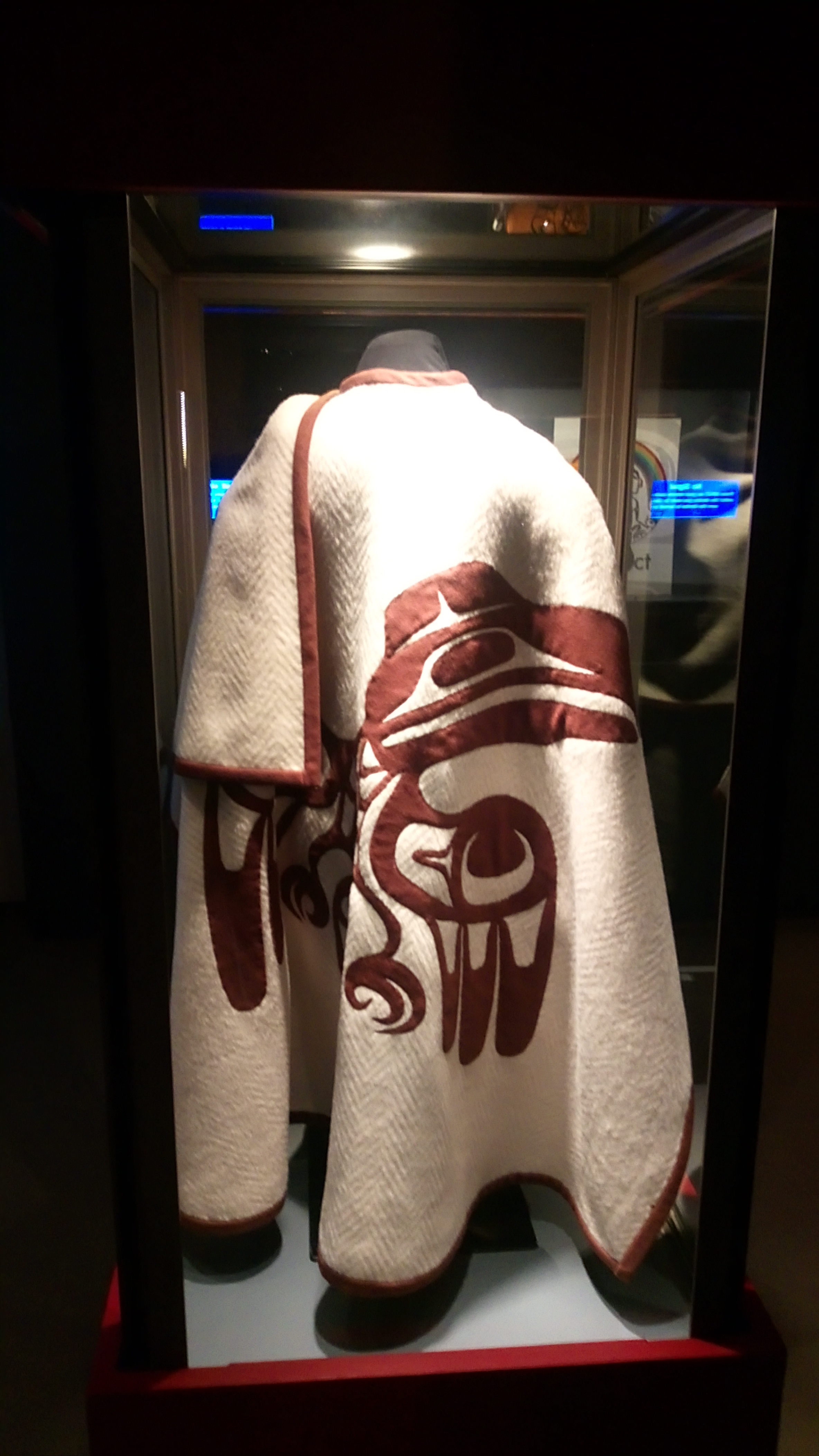 一件繡有渡鴉圖案的海達族斗篷。2018.7.7攝於溫哥華博物館。